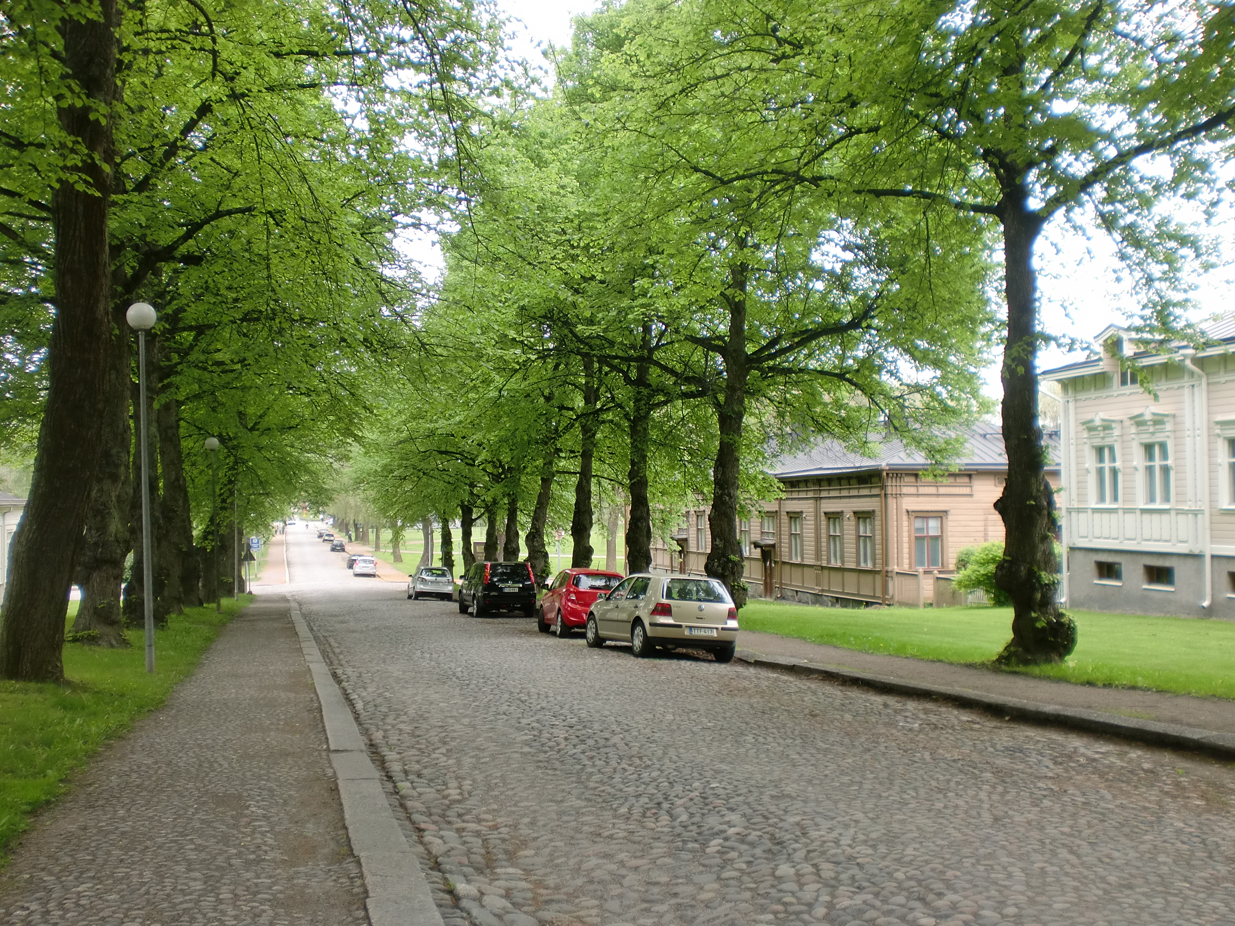 Hämeenlinnan Koilliskulman puutalokorttelit ja koulut; rakennettu kulttuuriympäristö Hämeenlinnassa